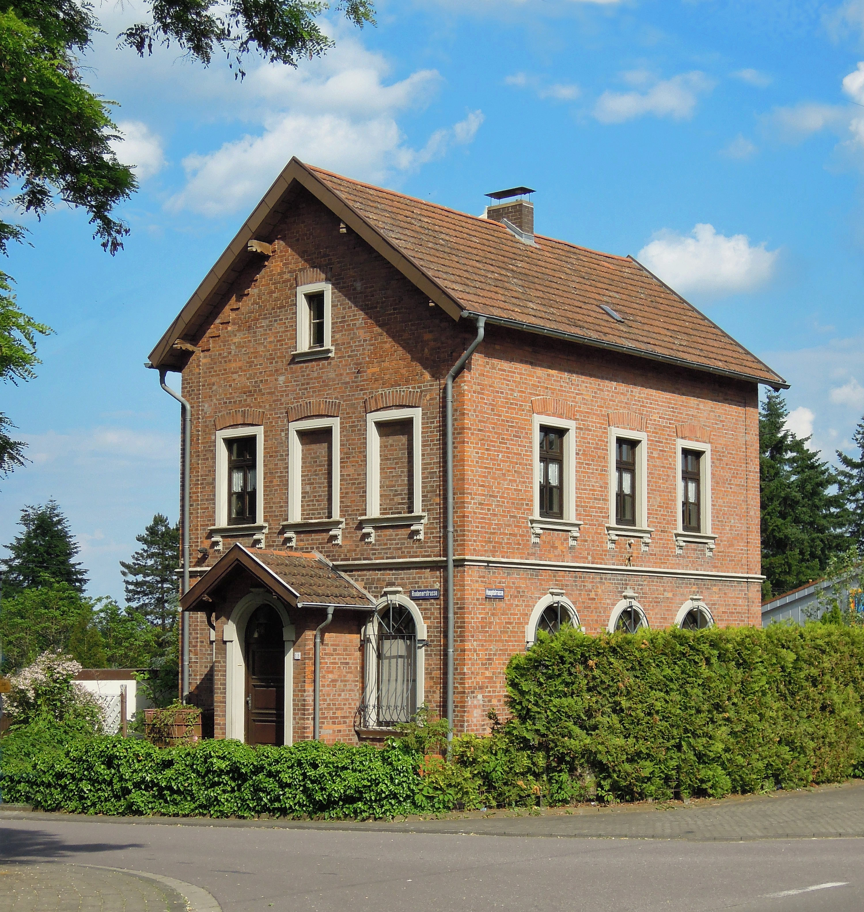 Hauptstraße 1, Bahnhofsempfangsgebäude, 1897 (Einzeldenkmal)